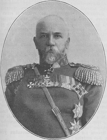 Петр Петрович Калитин, русский генерал. Это изображение было также использовано для иллюстрирования статьи «Калитин, Петр Петрович» опубликованной в одиннадцатом томе «Военной энциклопедии», который был издан книгоиздательским товариществом И. Д. Сытина в 1913 году в столице Российской империи городе Санкт-Петербурге.